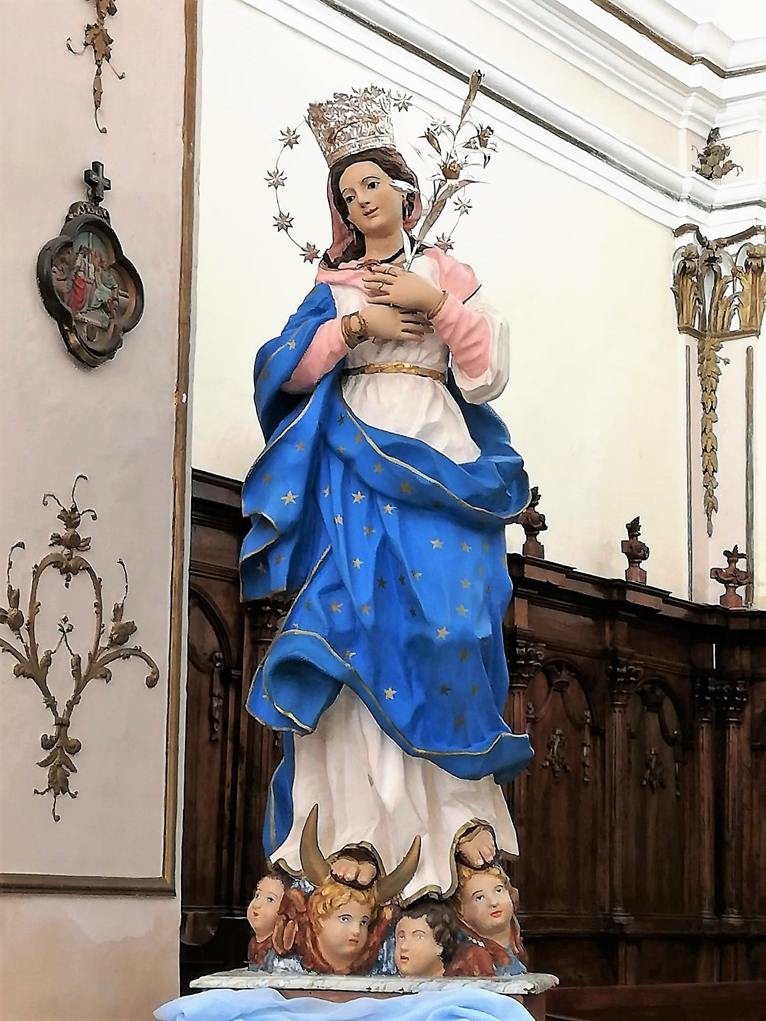 Intronizzazione del simulacro dell'Immacolata Concezione.